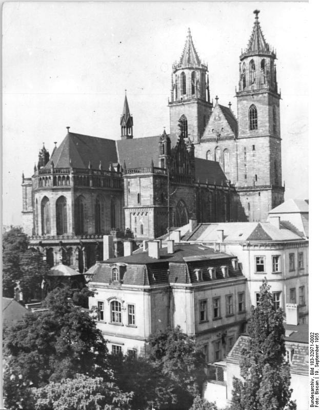 Zentralbild-Biscan Wjt-Ho. 7 Motive 19.9.1955 Der Dom zu Magdeburg zur Nutzung freigegeben Der in jahrelanger Arbeit wiederhergestellte Dom zu Magdeburg ist am 15.9. von der Baupolizei abgenommen und zur Nutzung freigegeben worden. Die feierliche Eröffnung des Doms ist für 22. September geplant und soll gleichzeitig mit der Einführung des neuen Bischofs Jänicke vorgenommen werden. Die Wiederherstellung des knapp vor Kriegsende von amerikanischen Bomben schwer zerstörten Doms hat über eine Million DM gekostet und wurde ausschliesslich aus den Staatsmitteln bestritten. Auch nach der Freigabe zur Nutzung sind viele kleinere Kriegsschäden zu beheben. UBz, Der Magdeburger Dom wiederhergestellt, wie vor dem denkwürdigen 16. Januar 1945, da ihn die amerikanischen Bomben schwer beschädigten. - Ansicht vom Osten her.